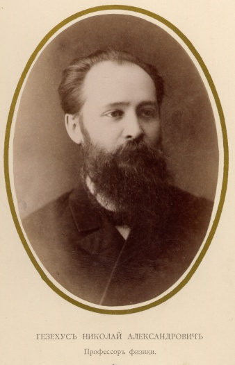 Николай Александрович Гезехус (1845—1918) — русский физик, профессор Императорского Сибирского университета и его первый ректор (1888—1889).